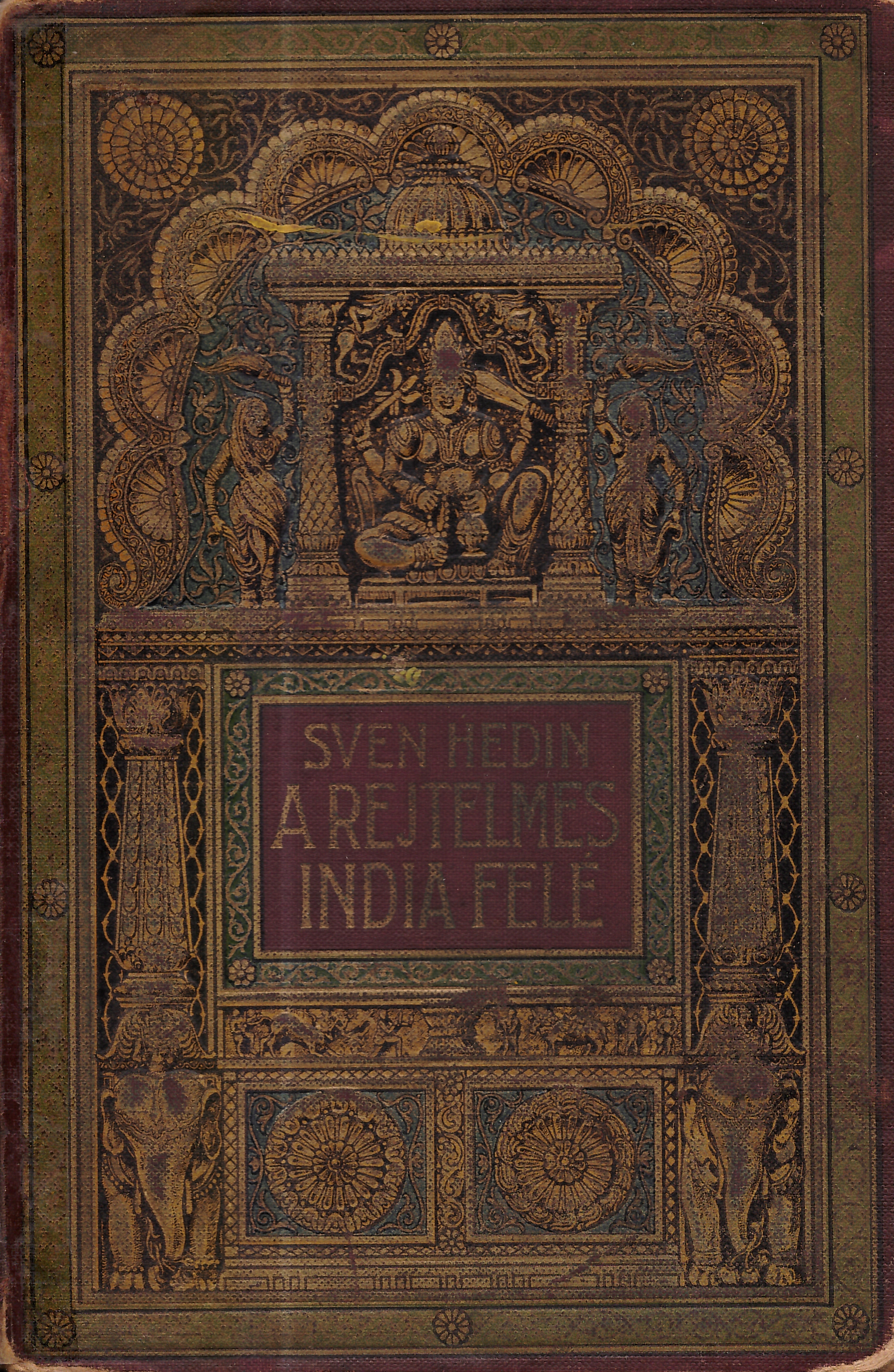 Borítódísz a "Sven Hedin: A rejtelemes India felé" című művön (1910 körül)